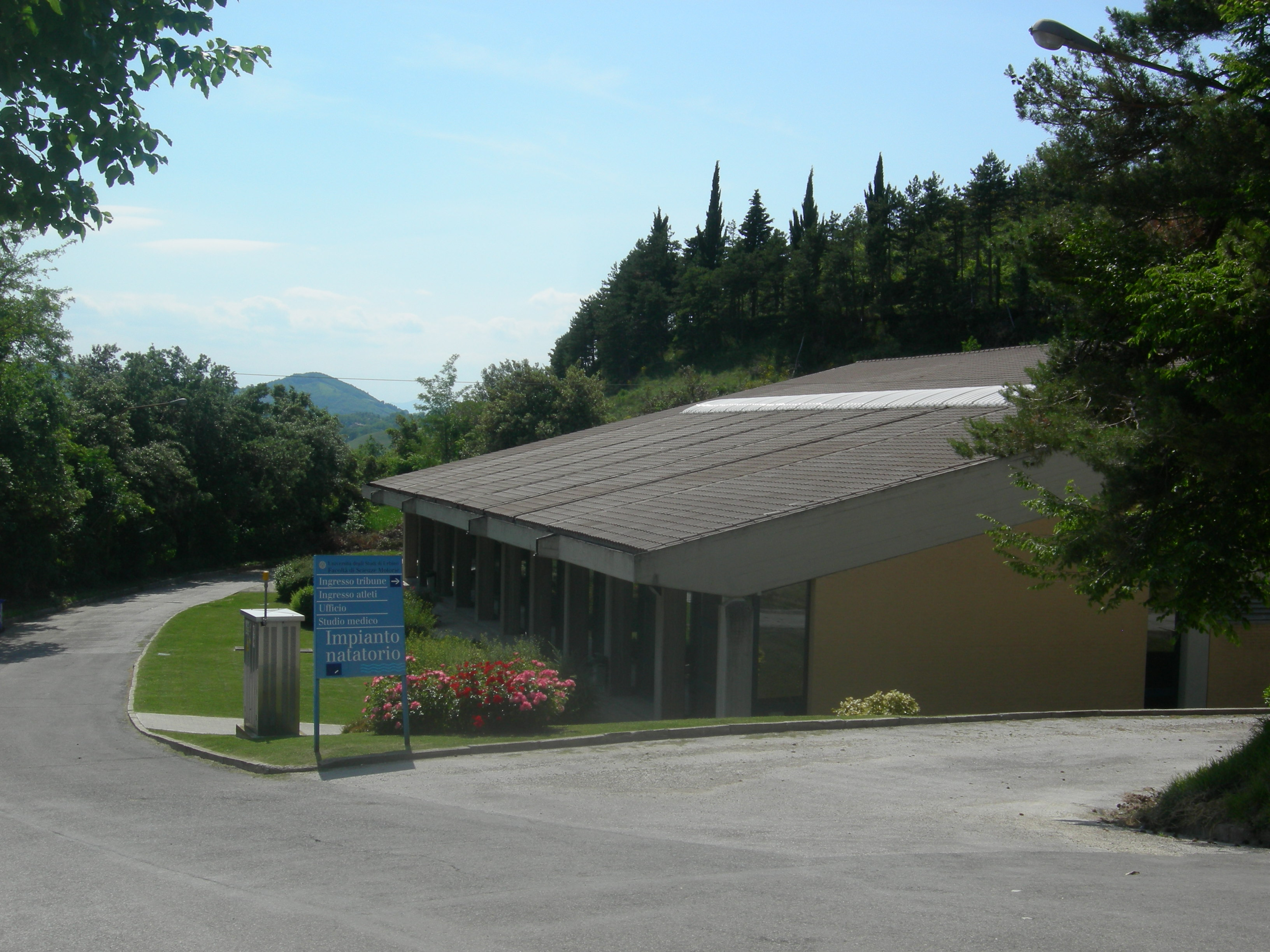 La Piscina Mondolce di Urbino.